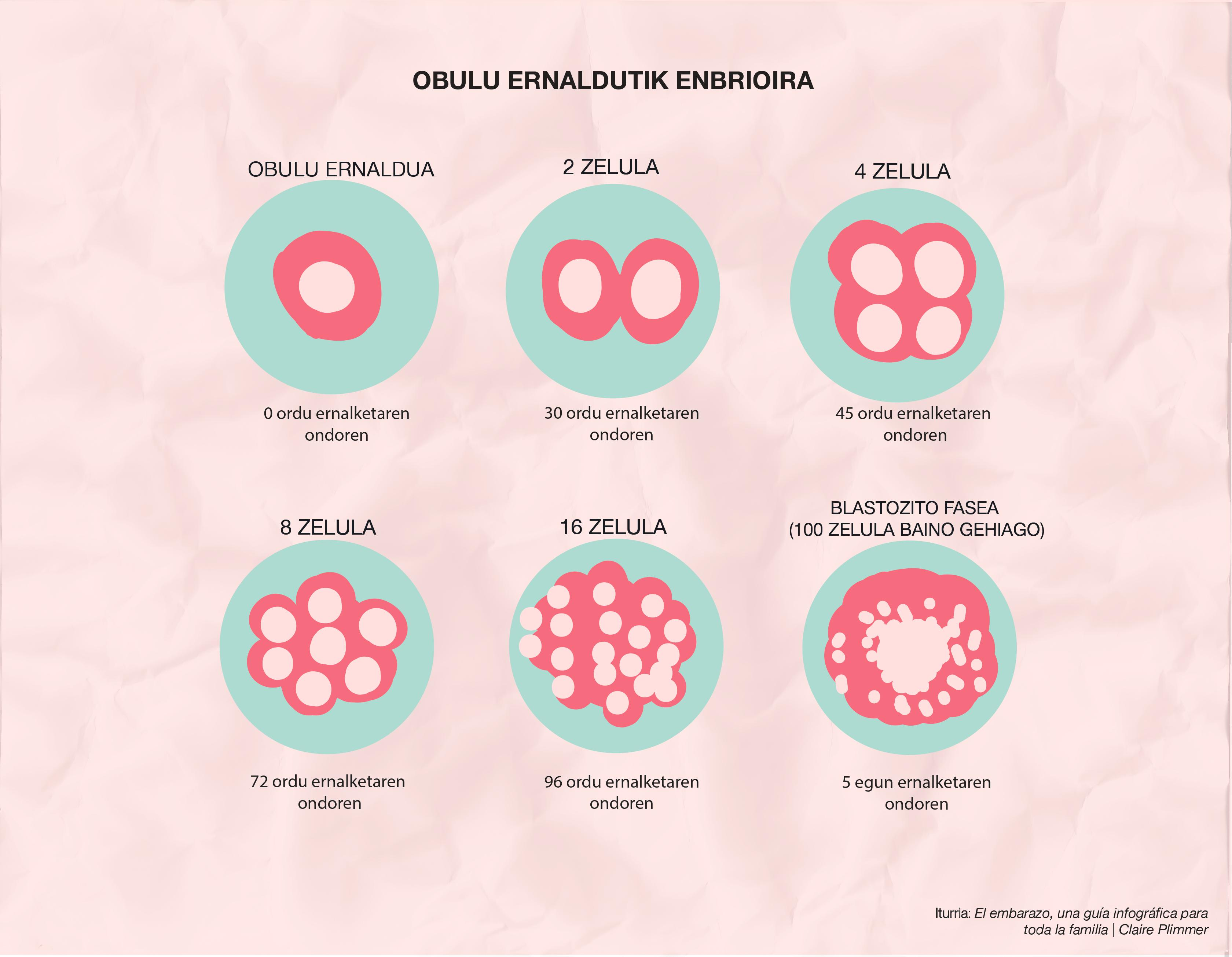 Obulua ernaldutik enbioira jasaten duen aldaketa.